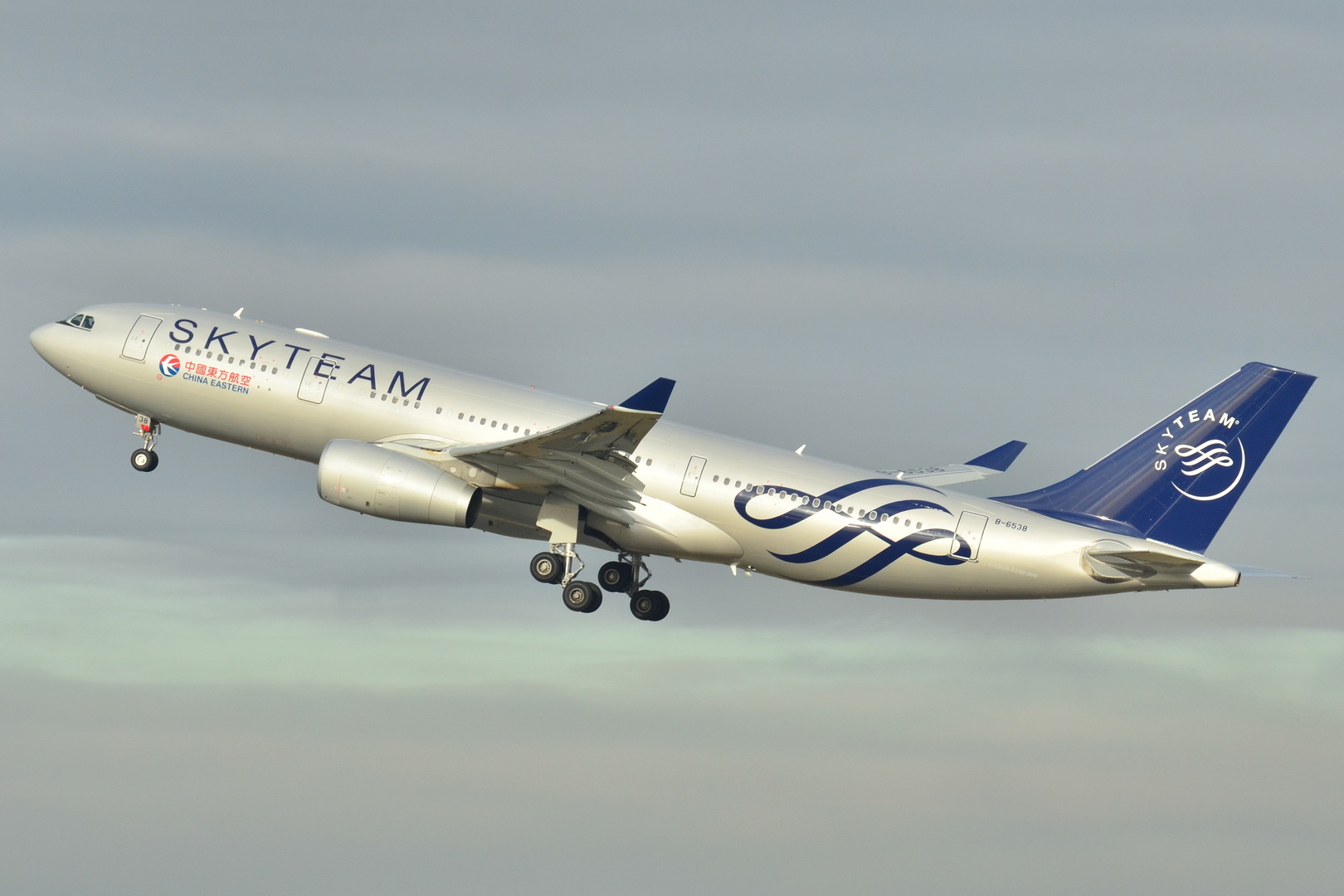 Photo prise à l'aéroport de Roissy-Charles de Gaulle (LFPG) en France. Picture take at Roissy-Charles de Gaulle Airport (LFPG) in France.